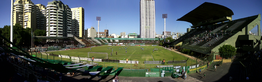 Estadio Arquitecto Ricardo Etcheverri del Club Ferro Carril Oeste